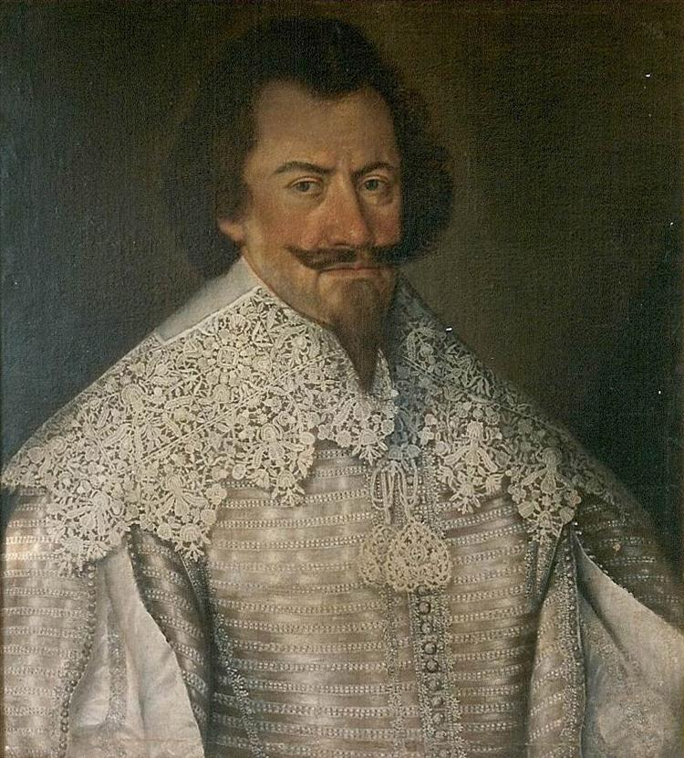 Porträt von Christian II. von Anhalt-Bernburg (1599-1656)